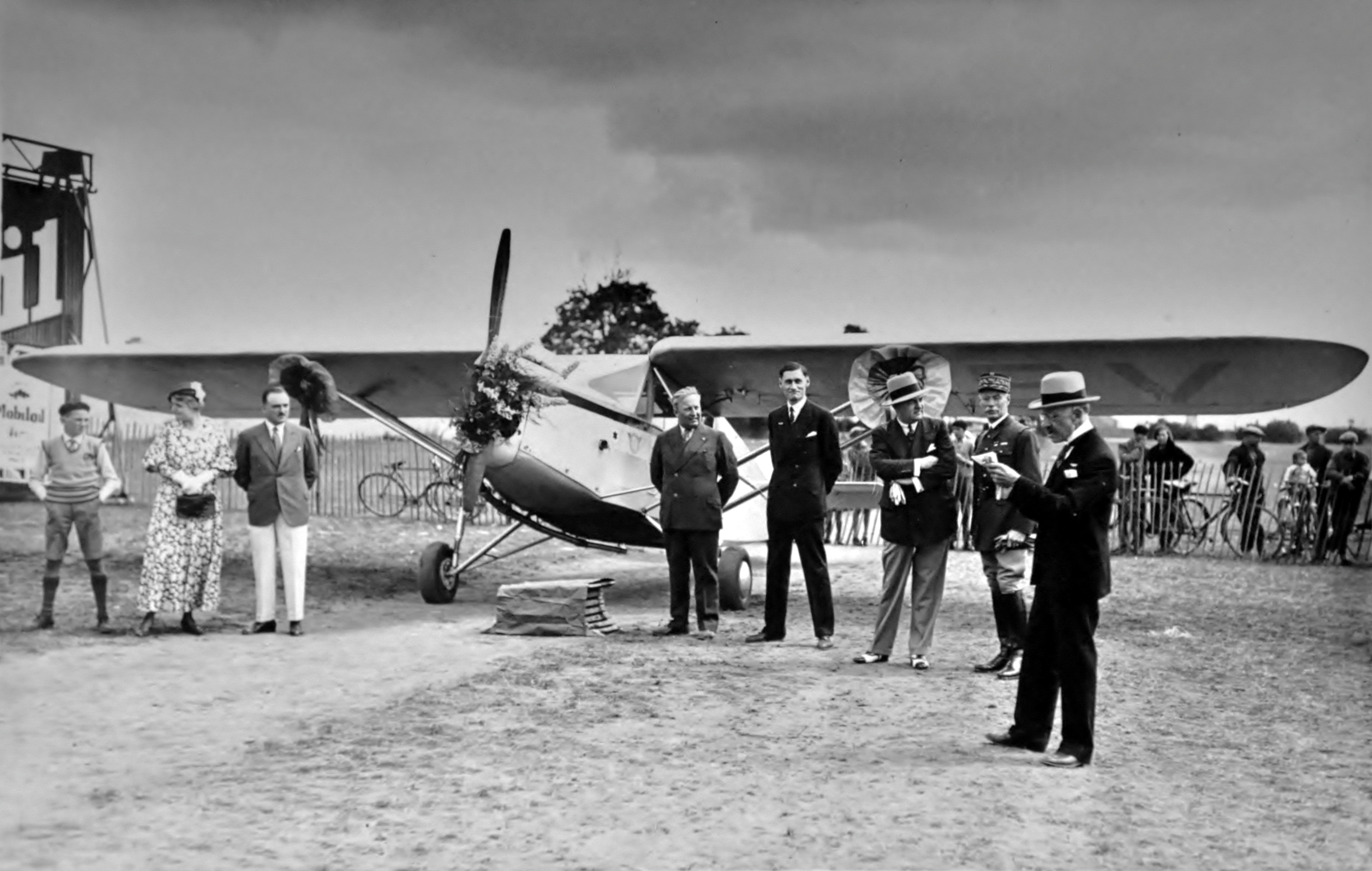 vers 1939 : Inauguration à l'aérodrome en présence du Maire et de sa femme (Présidente de la Croix-Rouge de Caen en 1940).